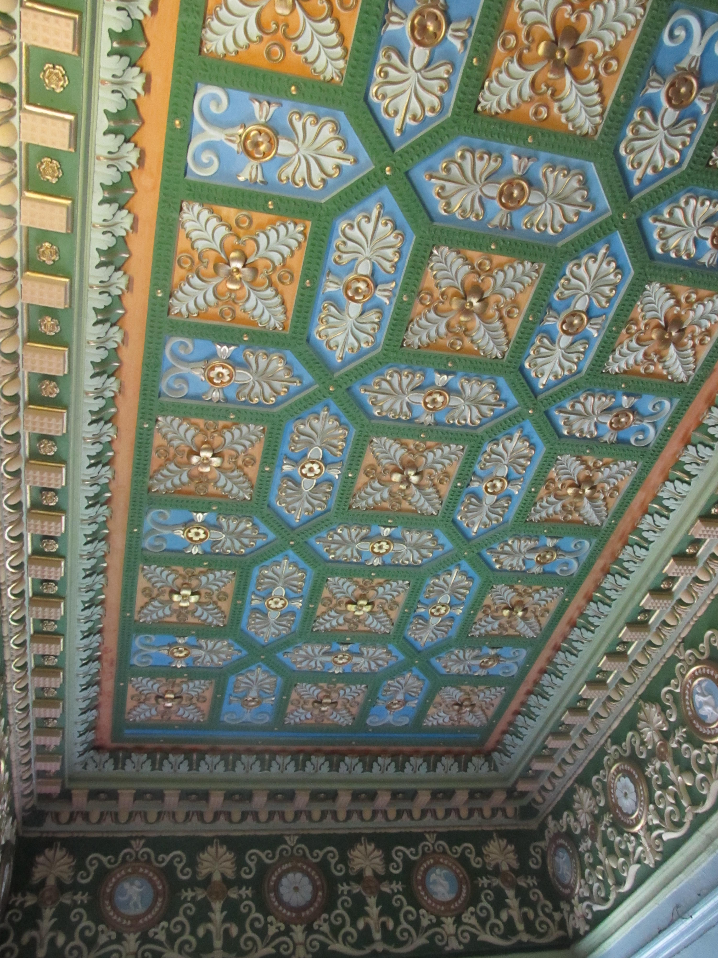 Беларуская (тарашкевіца): Палацава-паркавы ансамбль: палац з дэкаратыўным аздабленьнем інтэр’еру (ляпны дэкор, камін і печ, падлога з меандравым арнамантам, плафоны столі), гаспадарчыя пабудовы, парк. в. Жылічы This is a photo of Belarusian heritage monument. Reference number: 512Г000459 ( WLM)